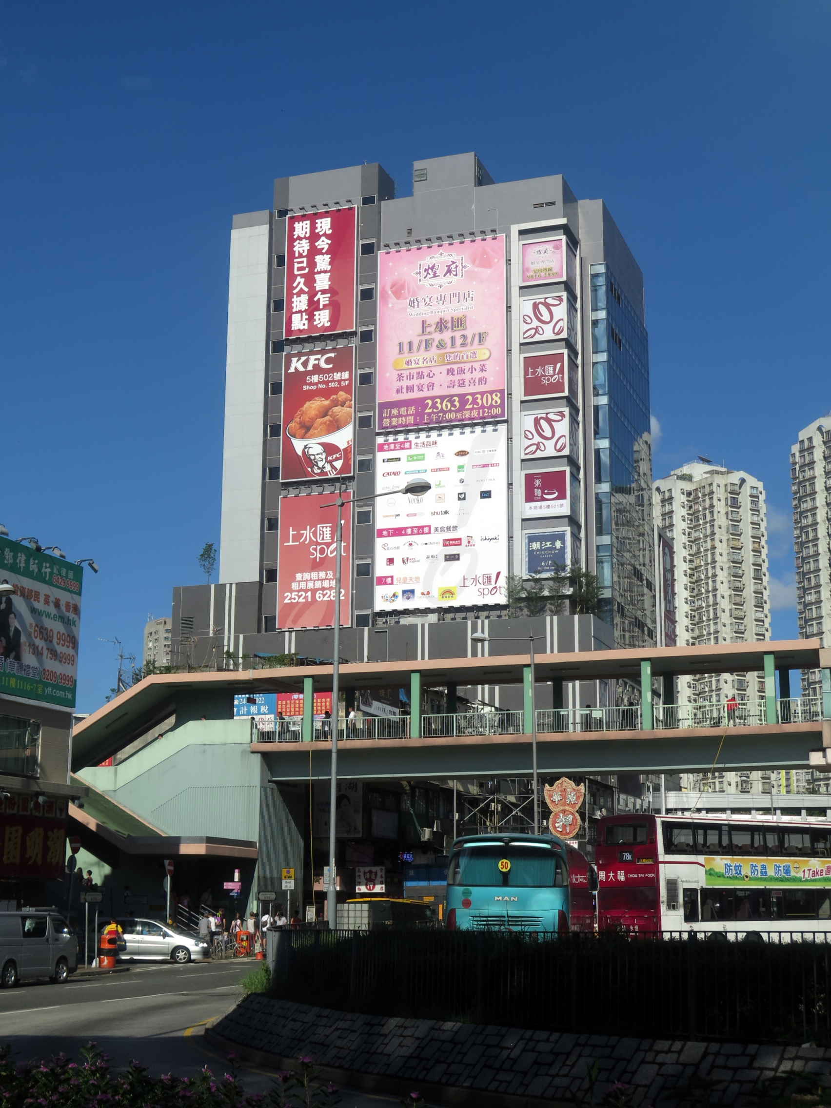 Sheung Shui Spot